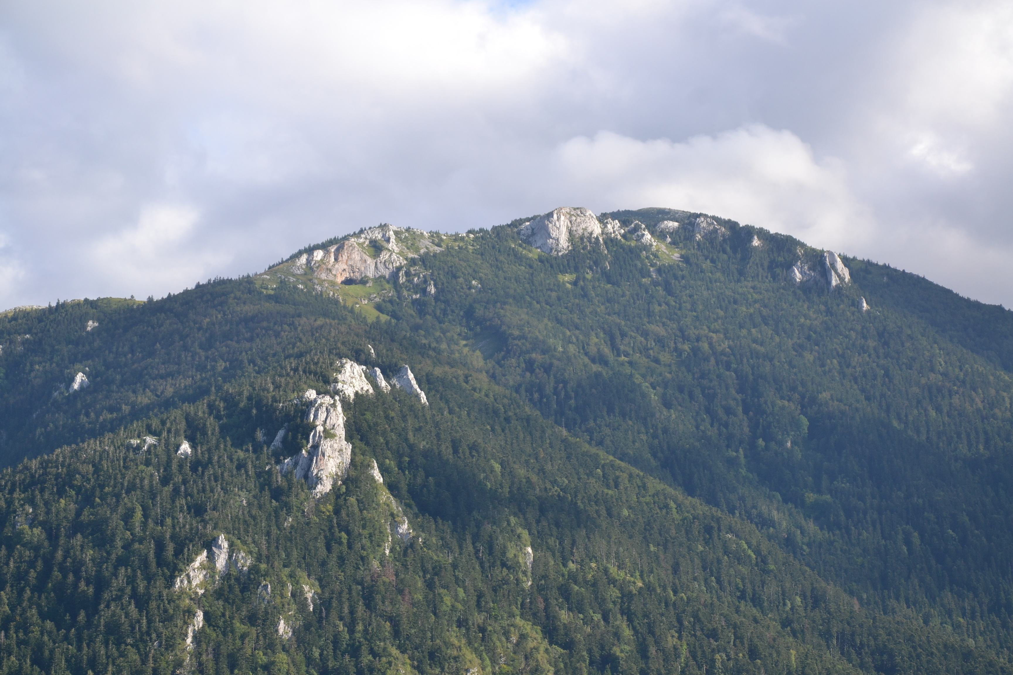 Montagne de la Frau (1925 m.), depuis le château de Montségur (Ariège, France).